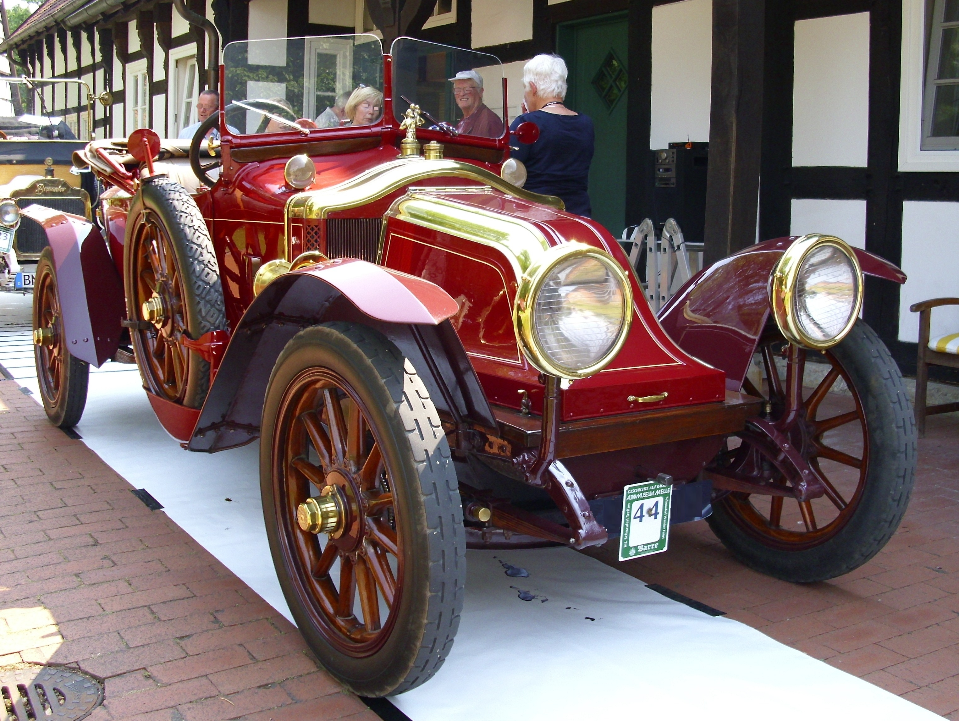 Renault Type EI Torpedo von Labourdette 1914